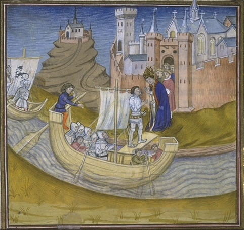 Gui, archevêque de Rouen, traitant avec Rollon, chef des Normands